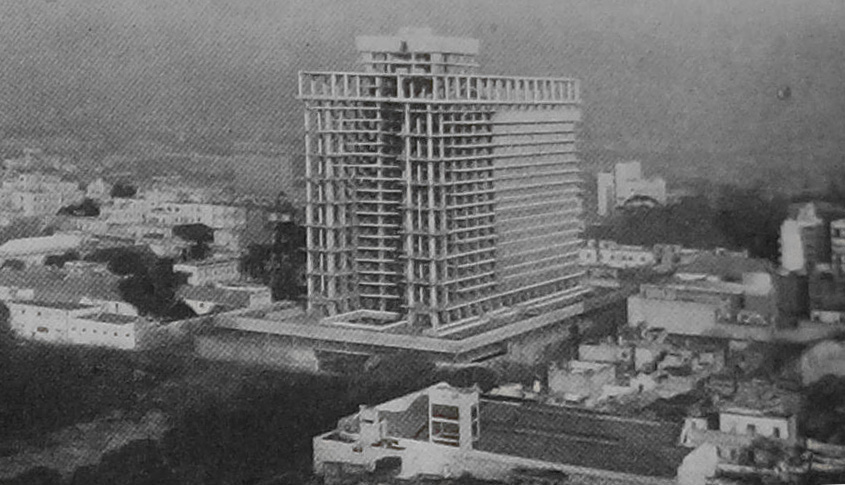 Vista de la obra en construcción para la Cárcel de Encausados de Buenos Aires. Inaugurada finalmente en 1979, se conocería como Cárcel de Caseros. El proyecto original, que contemplaba también el edificio de los Tribunales, no fue concretado. La cárcel fue demolida en 2004.